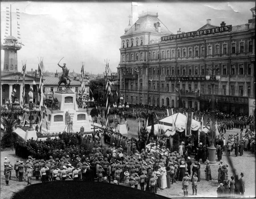 Москва. 1912 г. Открытие памятника генералу М. Д. Скобелеву на Тверской пл. Ничего изображённого не сохранилось.